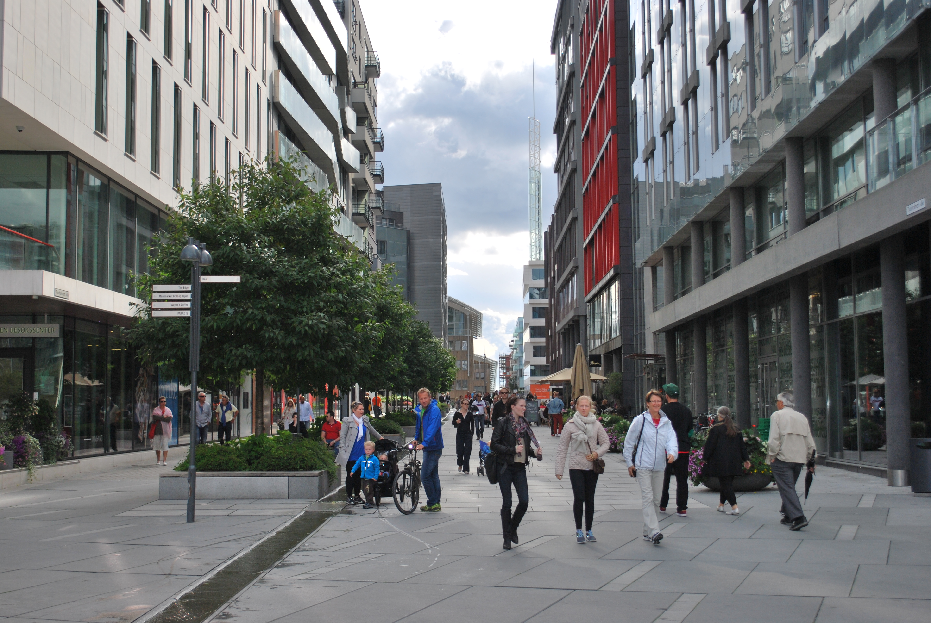 Tjuvholmen allé sett sydover fra Olav Selvaags plass, Tjuvholmen, Oslo